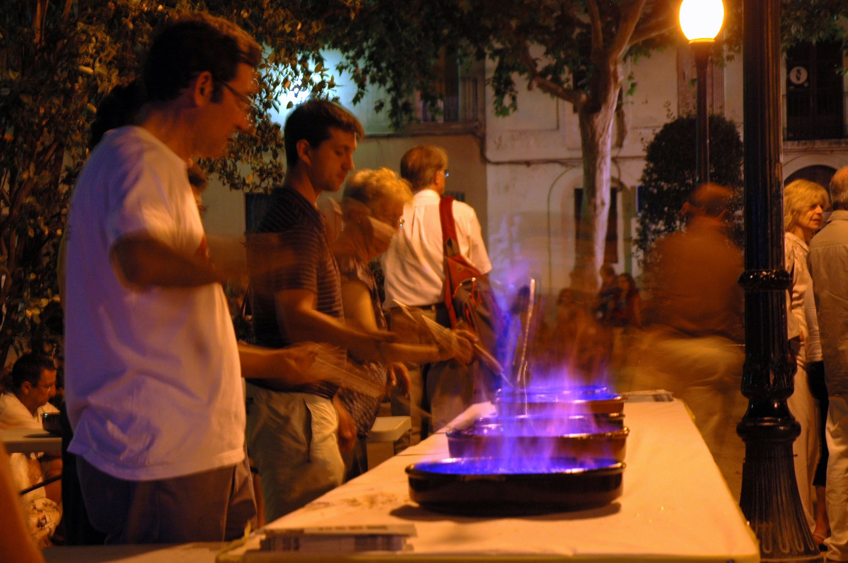 Rom cremat